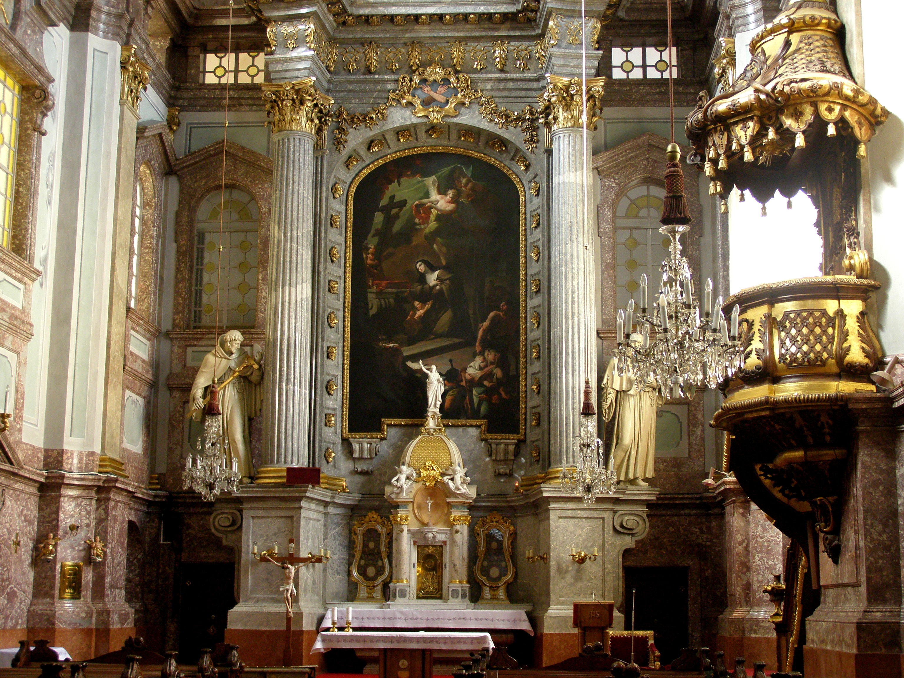 Hlavný oltár kostola s obrazom Videnie svätej Alžbety od Paula Trogera z roku 1741